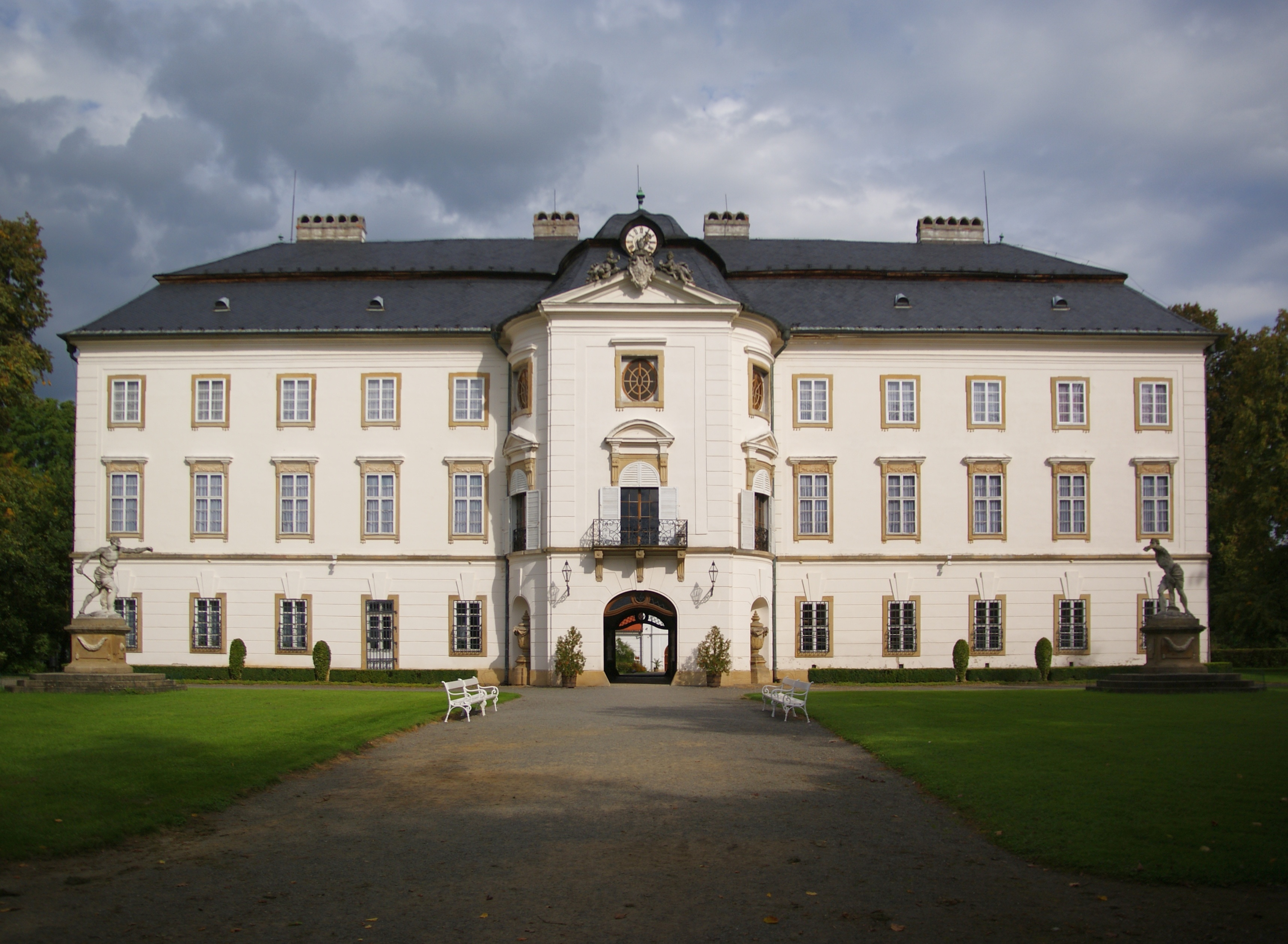 Zámek Vizovice Vizovice, nám. Palackého 376, Vizovice